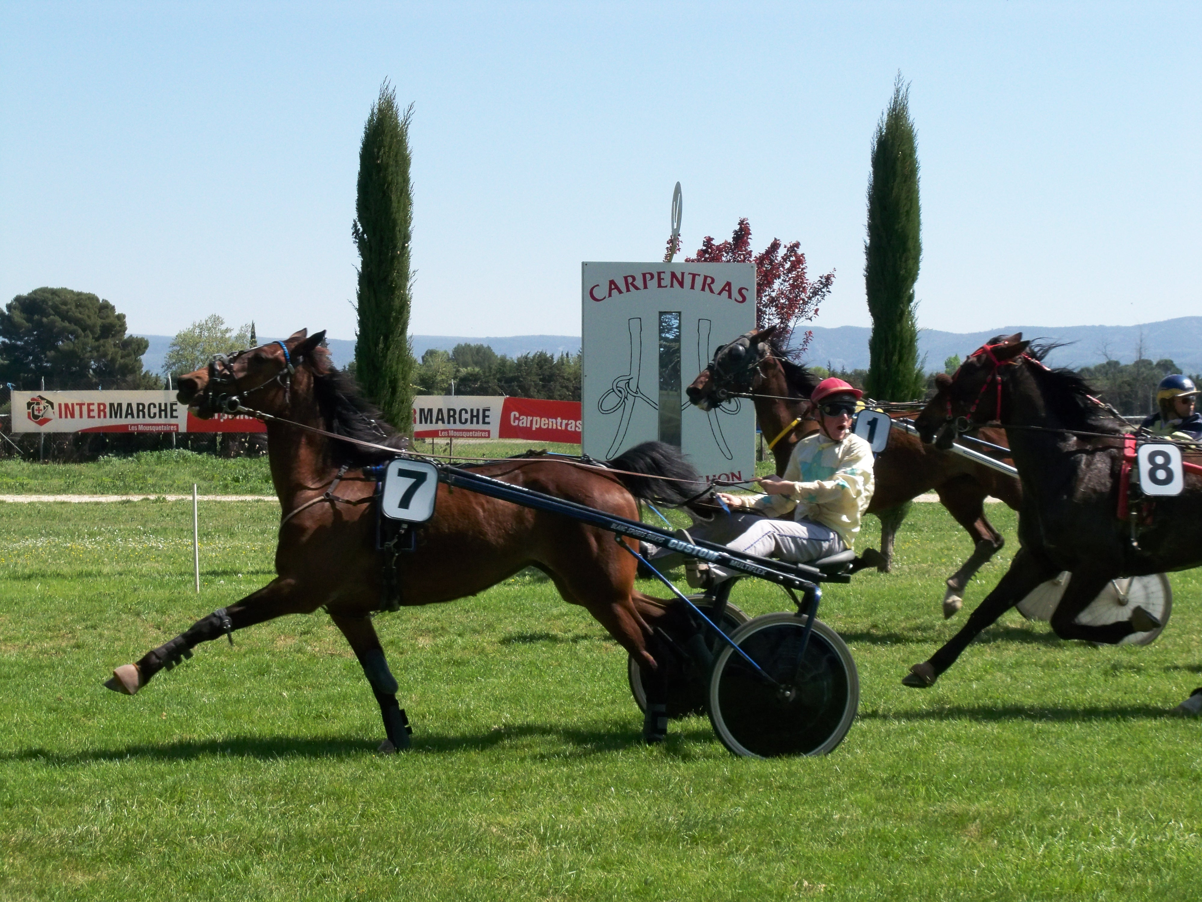 Arrivée à Saint Ponchon, Carpentras (84)